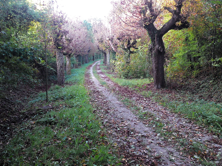 Teilstück der römischen Peutinger Straße von Vindonissa über Juliomagus nach Arae Flaviae an der Passhöhe bei Bechtersbohl (unterhalb der Küssaburg): Von der Anhöhe nach Norden in die Klettgau-Ebene.